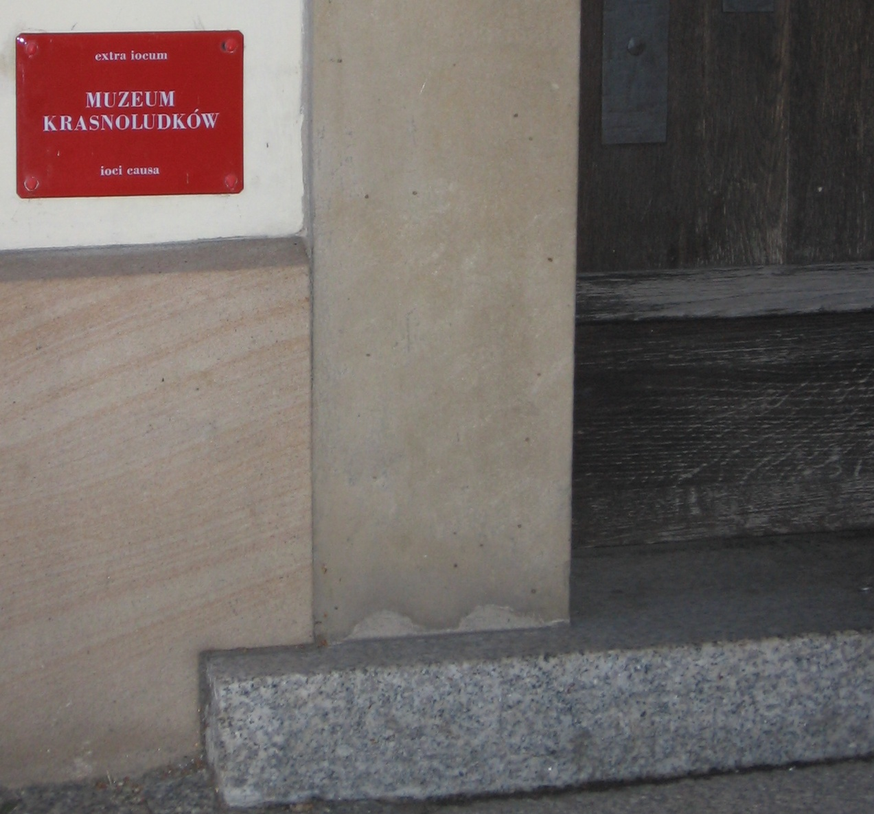 Wrocław, Poland - "Dwarf Museum"